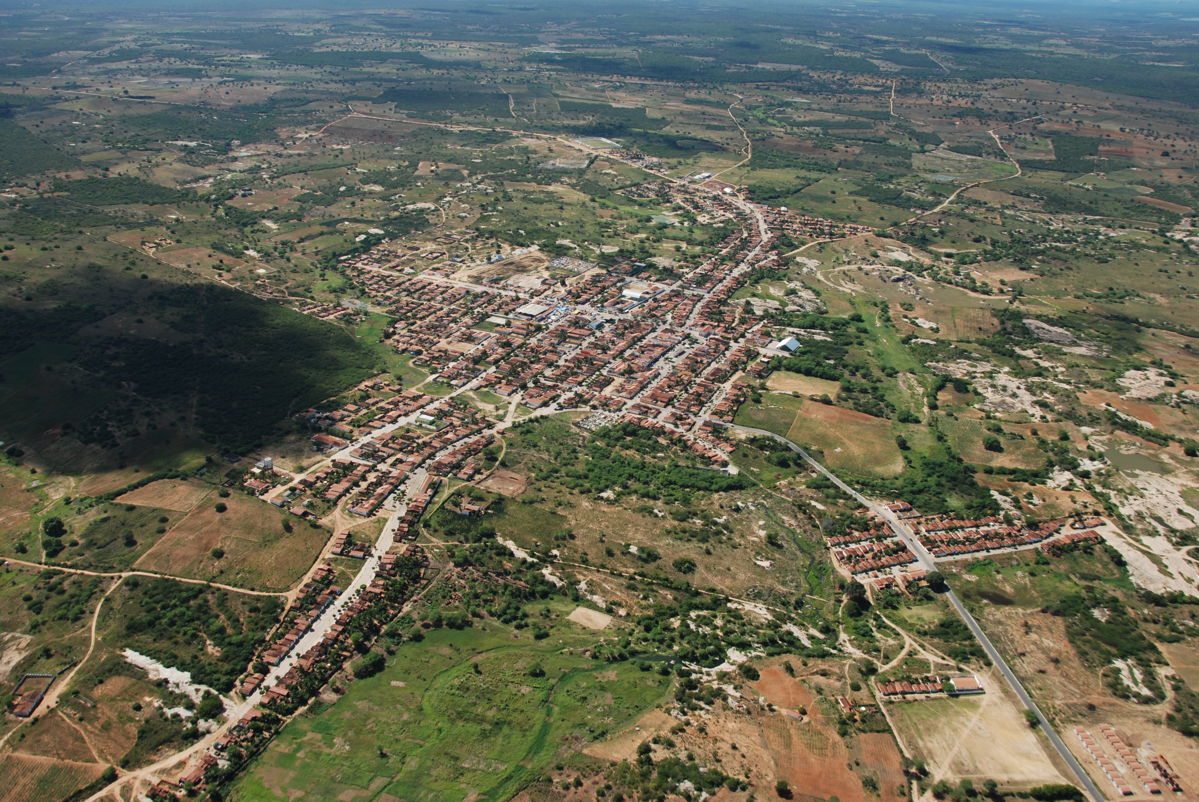 Vista Aérea da Cidade de Cubati